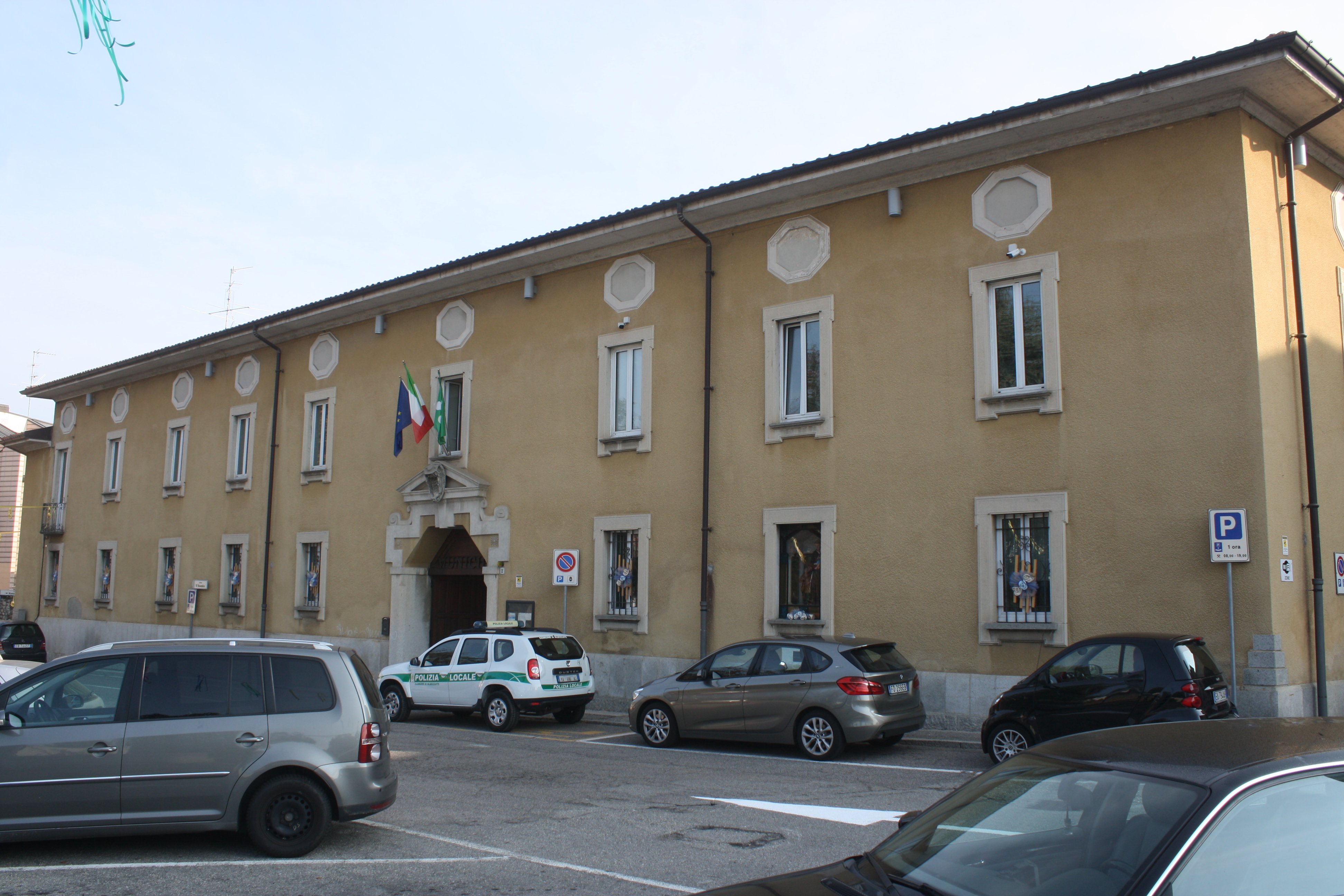 Villa Taverna, la sede comunale di Albizzate (VA).